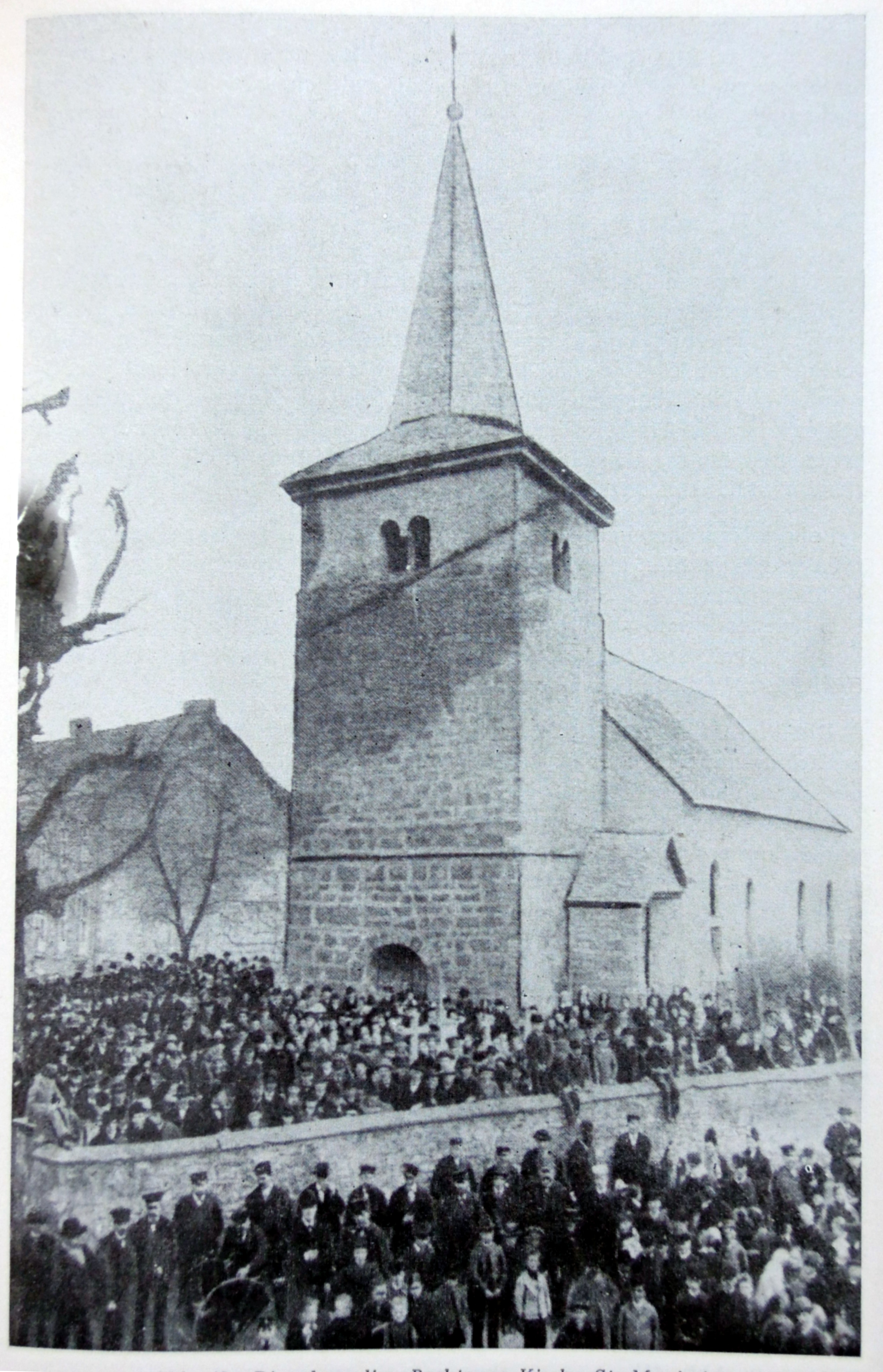 Katholische Kirche St. Maximin in Pachten. Die aus dem 12. Jahrhundert stammende Kirche wurde 1890 abgerissen und durch die im früh-romanischen Stil gehaltene heutige Kirche ersetzt.